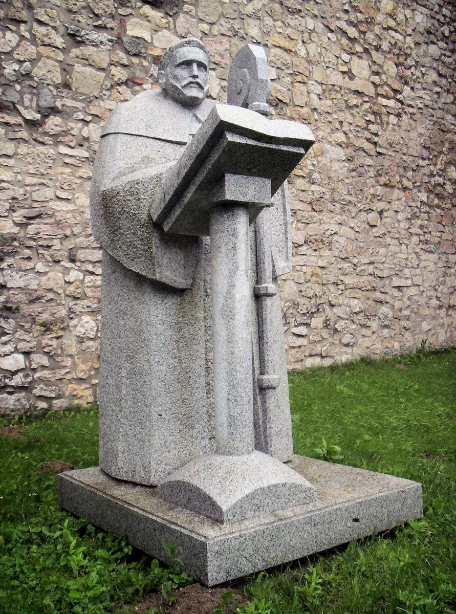 Szent Asztrik érsek szobra a Pécsváradi Bencés Kolostor előtt. Portugál fehér gránit, Rigó István szobrászművész alkotása (2000) Photo taken by uploader User:Csanády